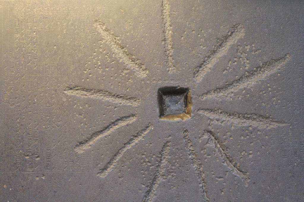 Shabaka Stone.